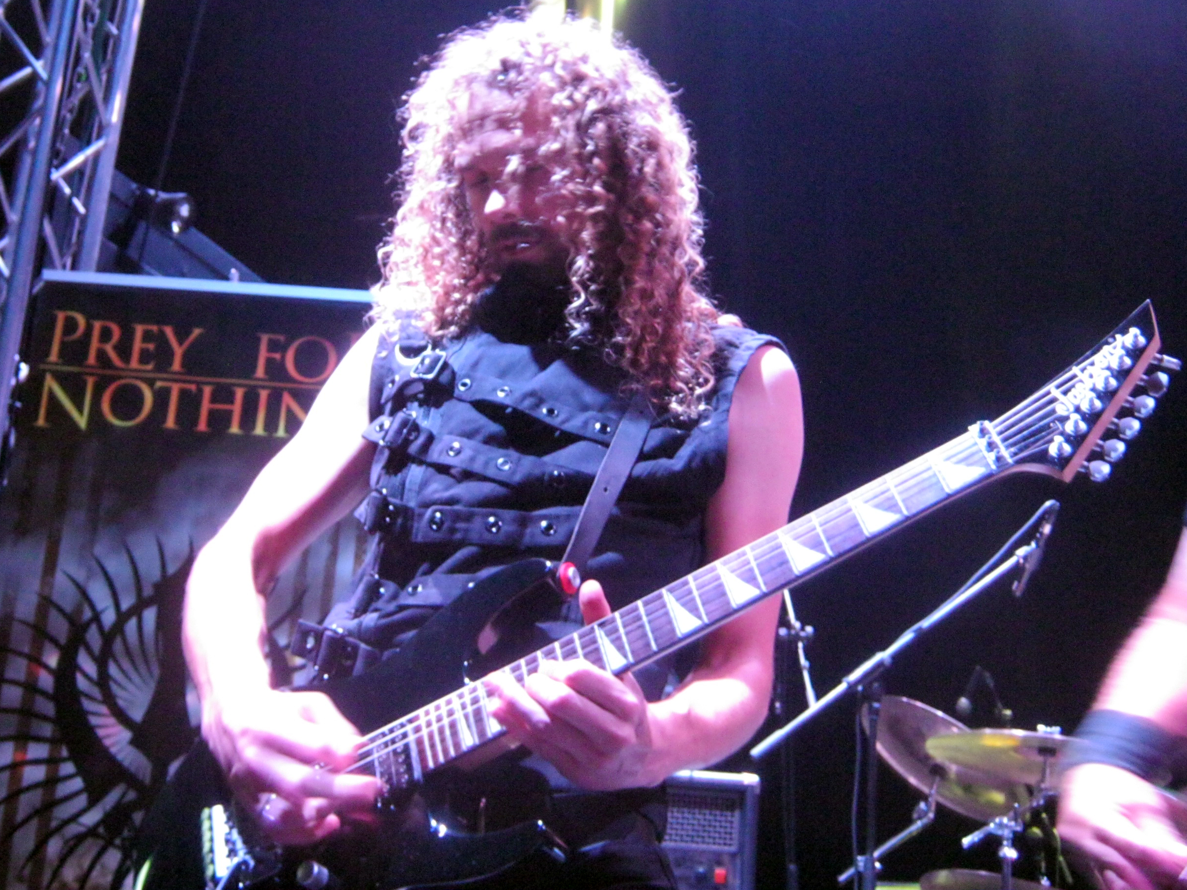 Prey For Nothing Vs Scardust - Metal Fight 02.06.16, Israel